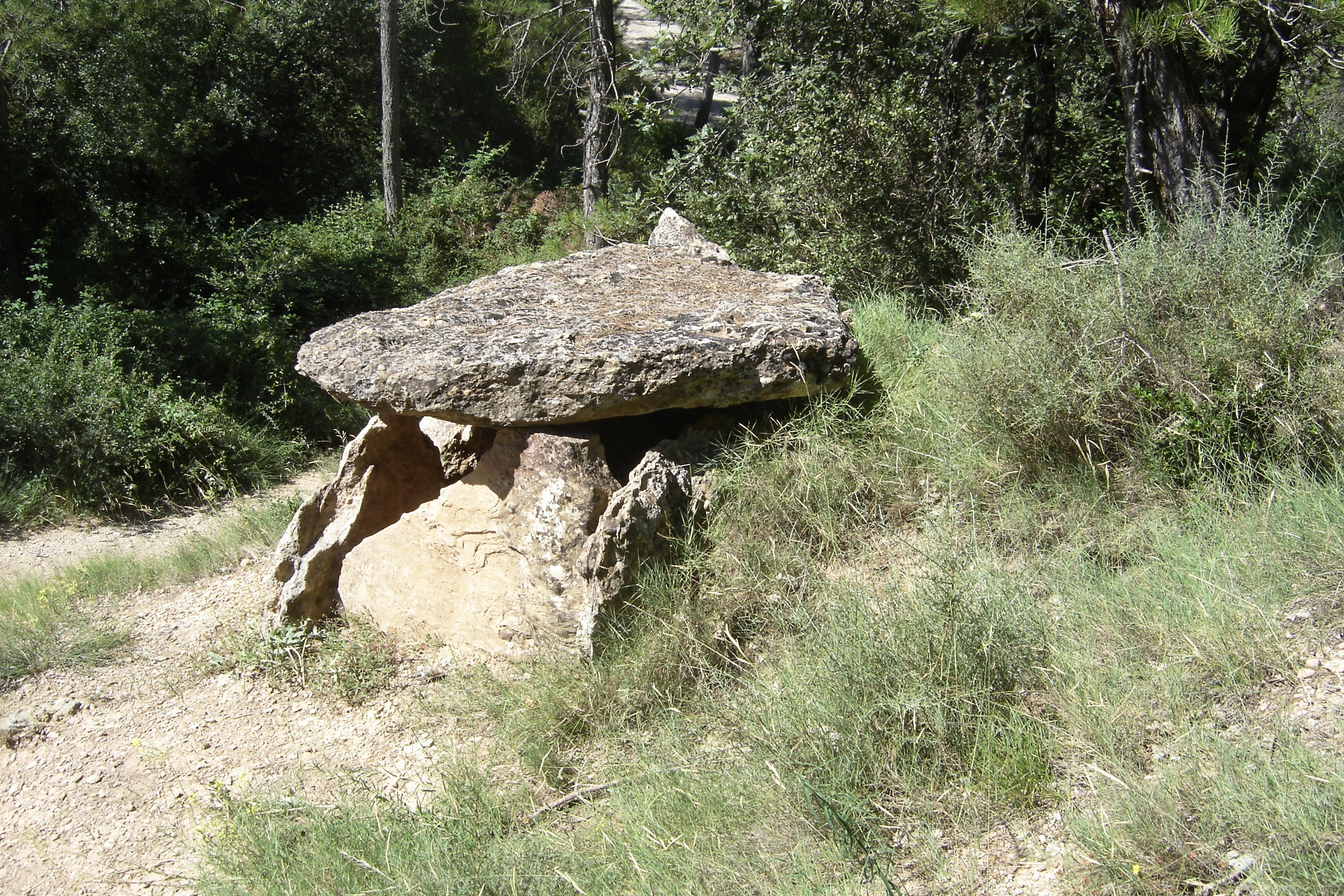 La denominada TOMBA 1 de la Necrópolis de Ceuró (Castellar de la Ribera, Solsonès)